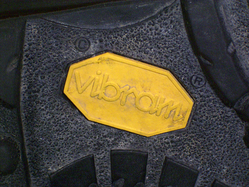 Vibram-Logo